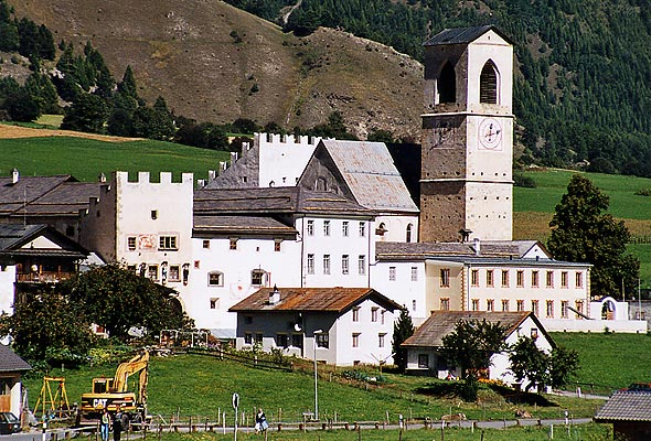 Benediktinerkloster St. Johann